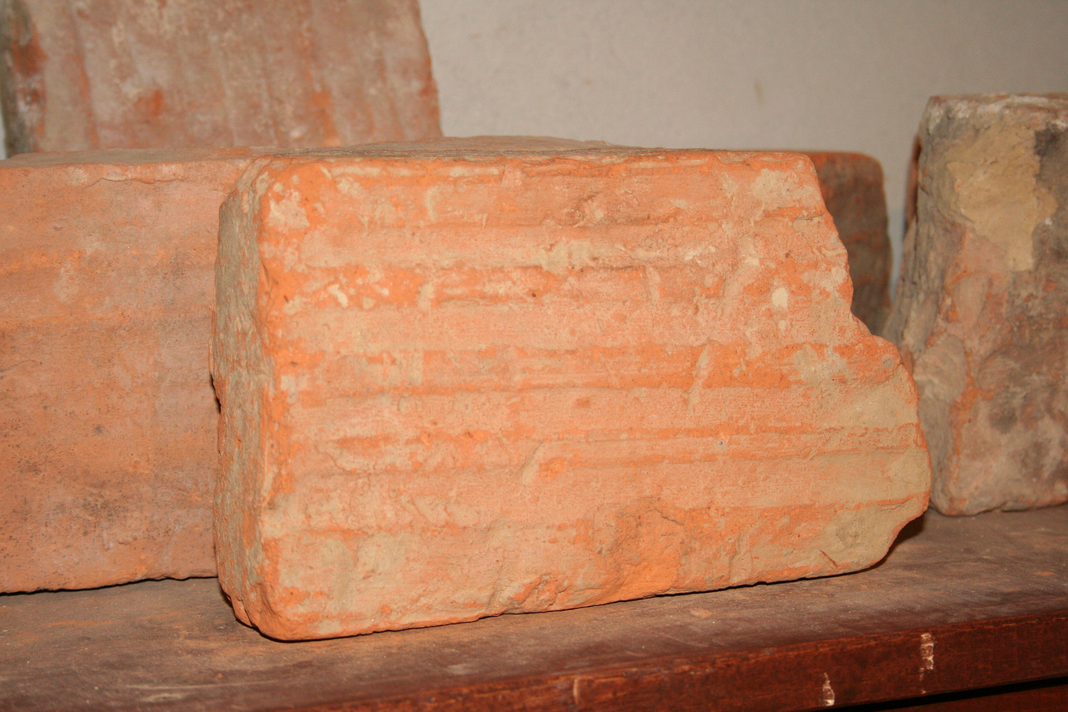 Średniowieczna cegła w podziemiach Rzeszowa